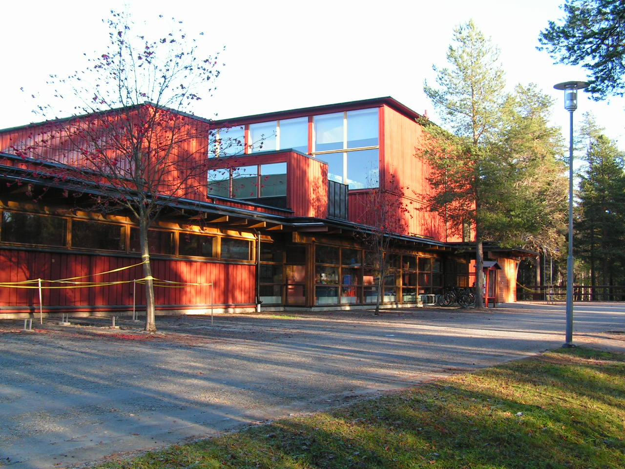 Ålidhem Church, Umeå (Ålidhems kyrka, Umeå)